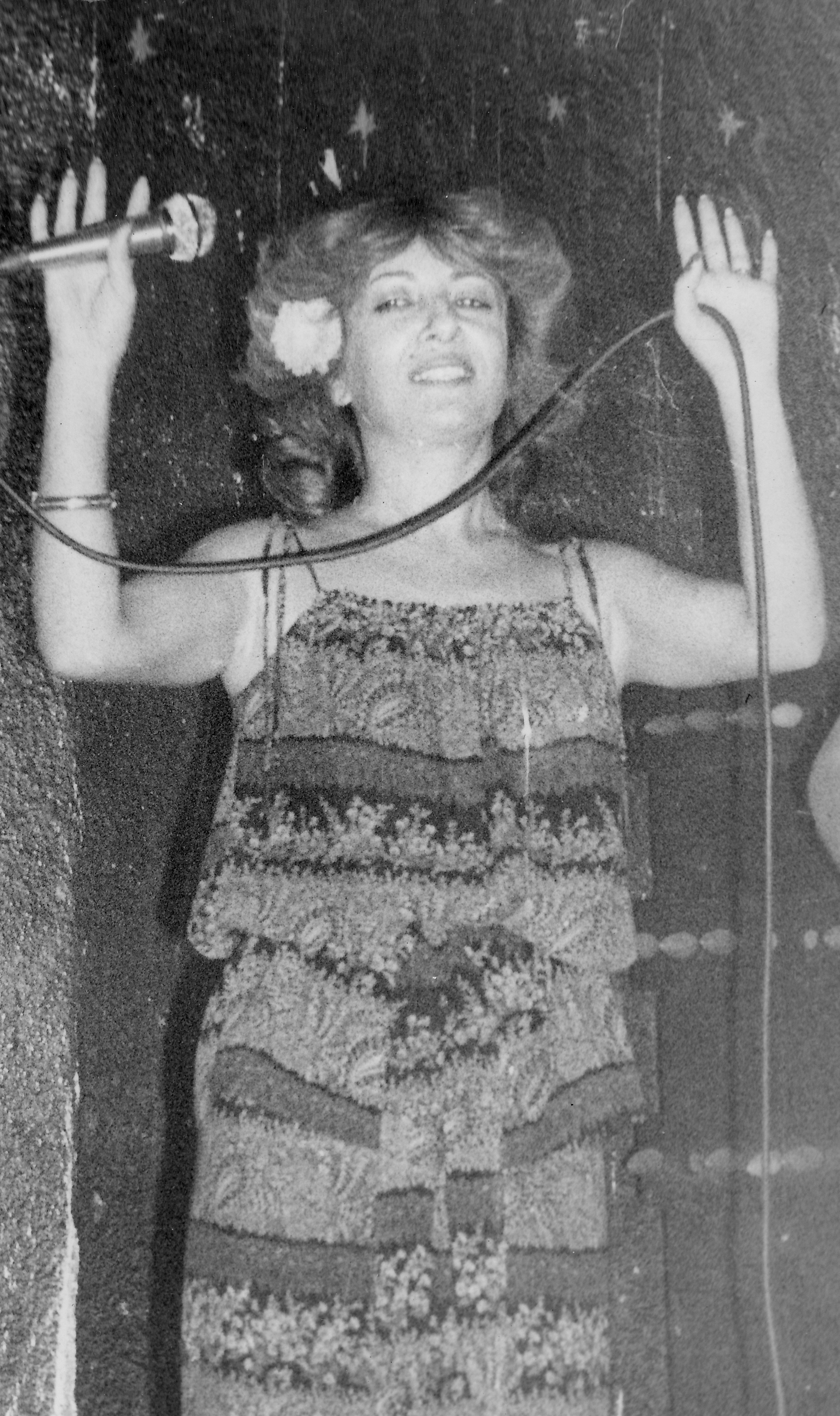 Voditeljka Danka Novović na Filmskim susretima u Nišu 1984. godine